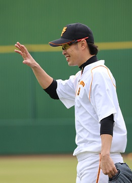 ジャイアンツ亀井選手